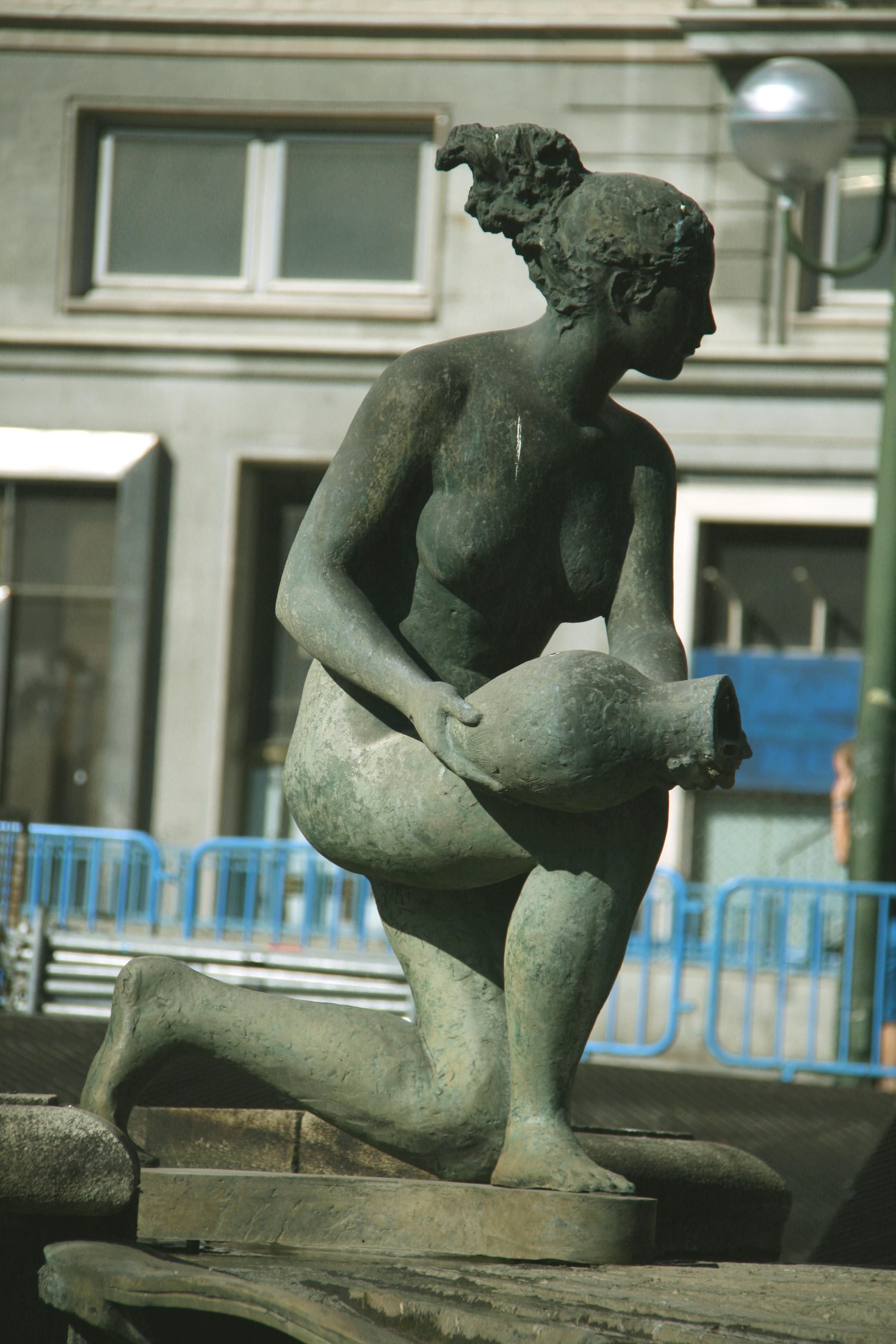 Fuente de plaza de España